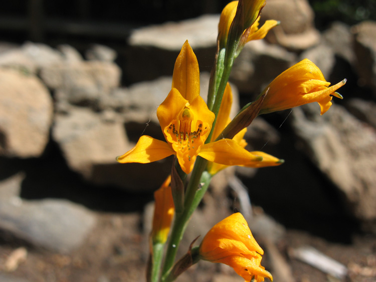 Orquídea